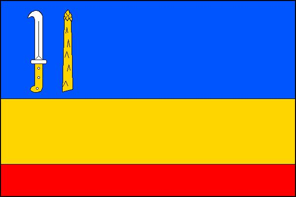 Vlajka obce Trboušany